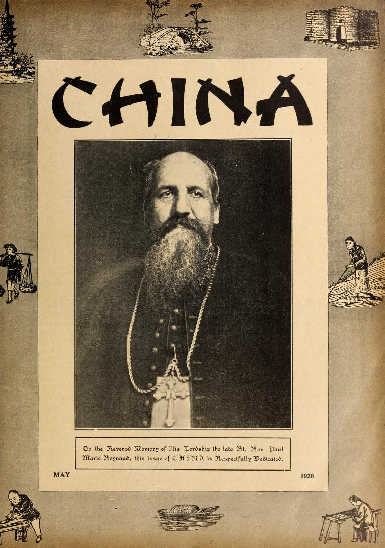 Couverture de la revue missionnaire China (n° mai 1926) éditée par la Société des Missions étrangères de Scarboro, avec le portrait de Mgr Paul-Marie Reynaud C.M., vicaire apostolique de Ningpo en Chine, décédé en février 1926.